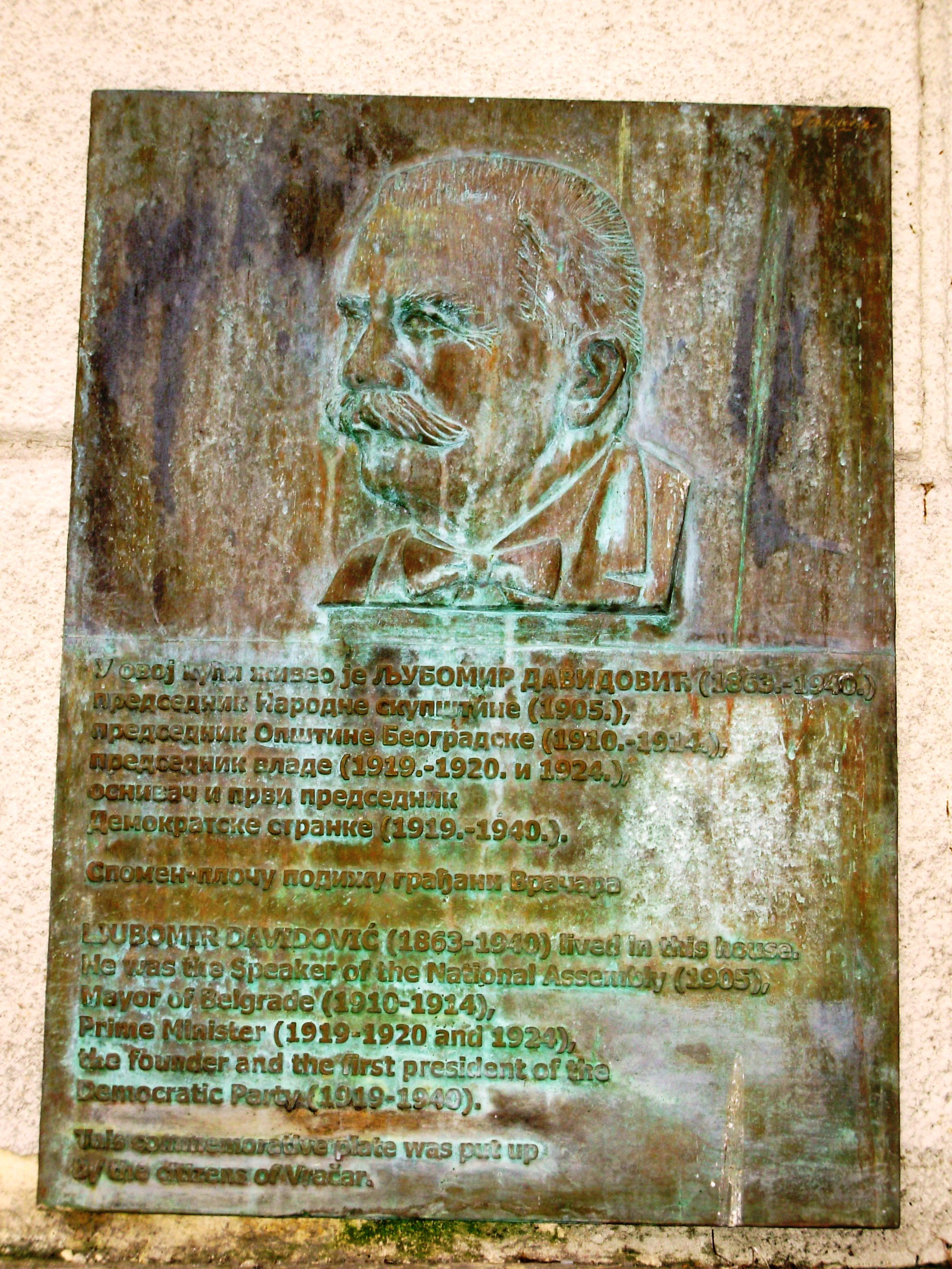 Tabla na Vračaru na kući gde je živeo Ljubomir Davidović, Beograd. Slikao Goldfinger